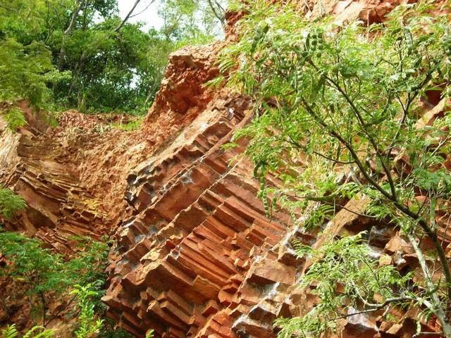 Cerro Koi, Aregua, Paraguay